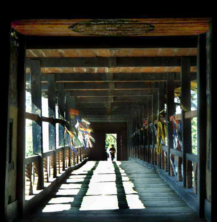 ხიდი მდინარეზე პაროსაკენ.